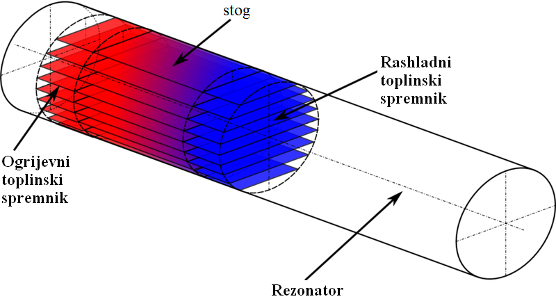 Prikaz termoakustičnog uređaja na topli zrak. Izmjenjivač topline (toplinski most nije prikazan) ima toplu stranu koja provodi toplinu prema ili iz ogrijevnog toplinskog spremnika - i hladnu stranu (hladni most nije prikazan) koja provodi toplinu prema ili iz rashladnog toplinskog spremnika. Elektro-akustični pretvornik, npr. zvučnik, nije prikazan.